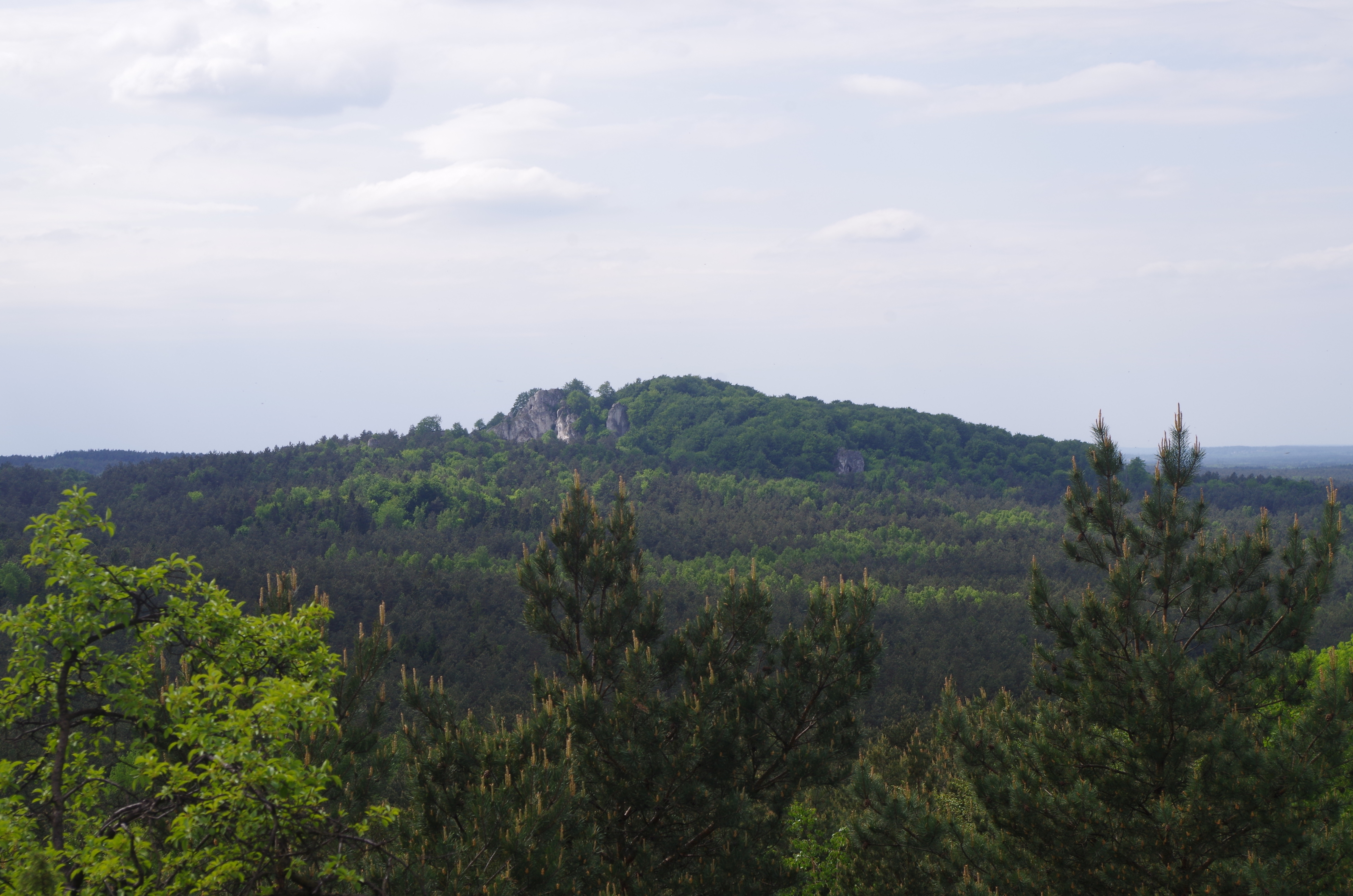 Widok ze skał Biblioteki w Podlesicach na Rzędkowickie Skały i samotną Leśną Turnię